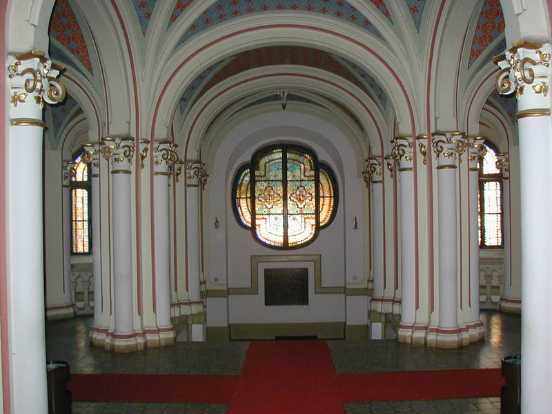 Kecskeméti Városháza beltér